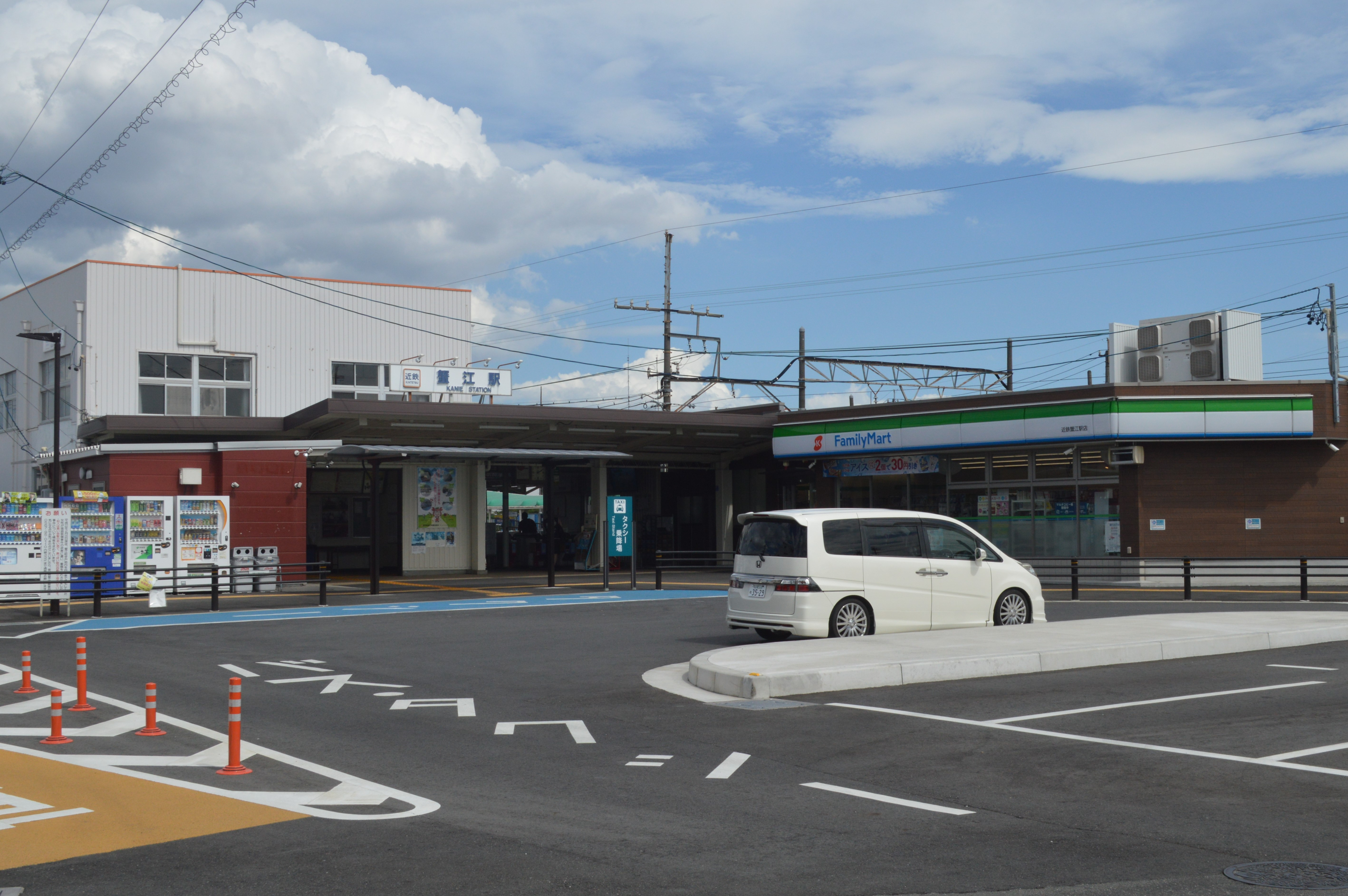 近鉄名古屋線近鉄蟹江駅。愛知県海部郡蟹江町。